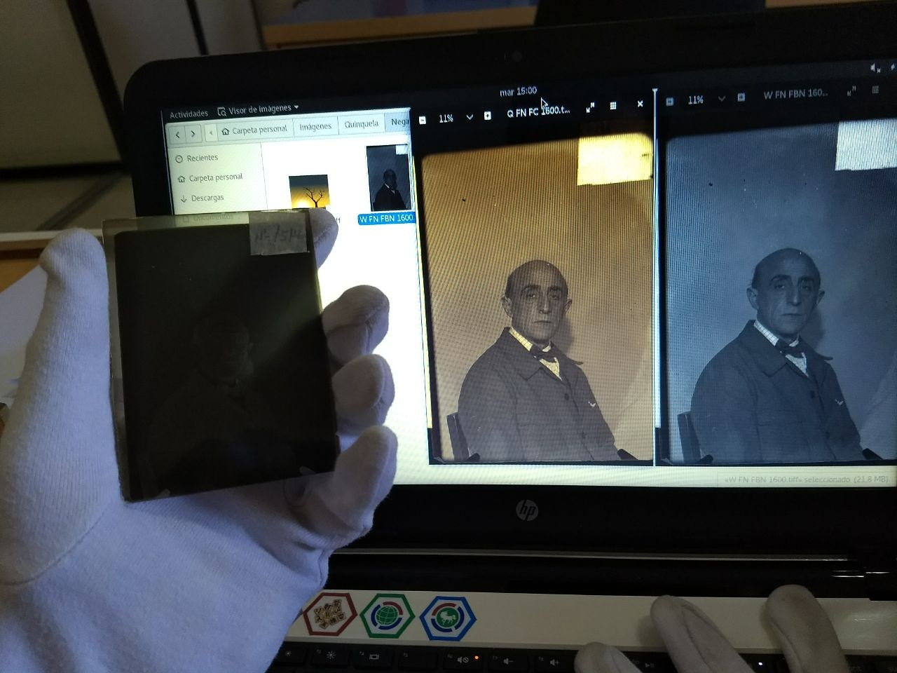 Digitalizando las diapositivas en el Museo Benito Quinquela Martin